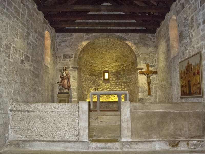 Crkva sv. Lucije u Jurandvoru